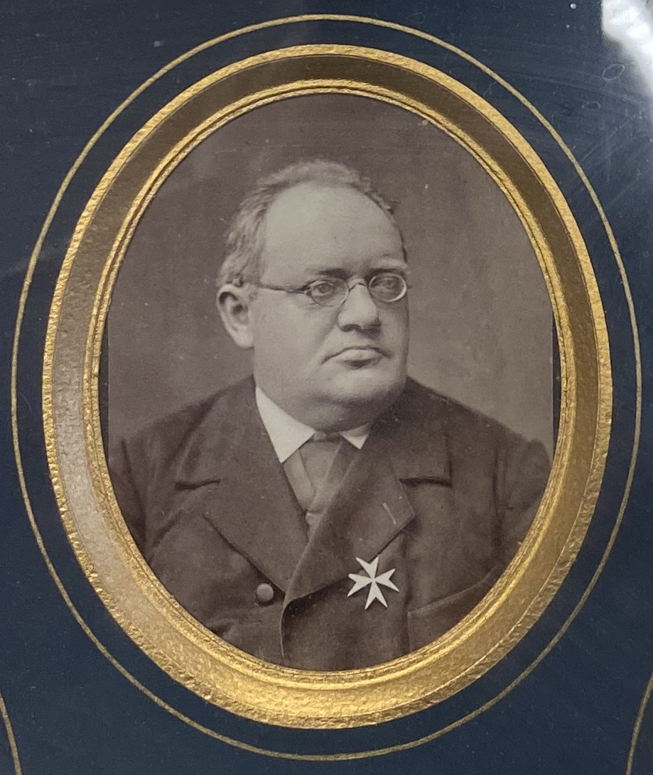 Římskokatolický kněz Wenzel Hieke O. Melit., na tablu 25. kněžského jubilea dne 31. 7. 1885